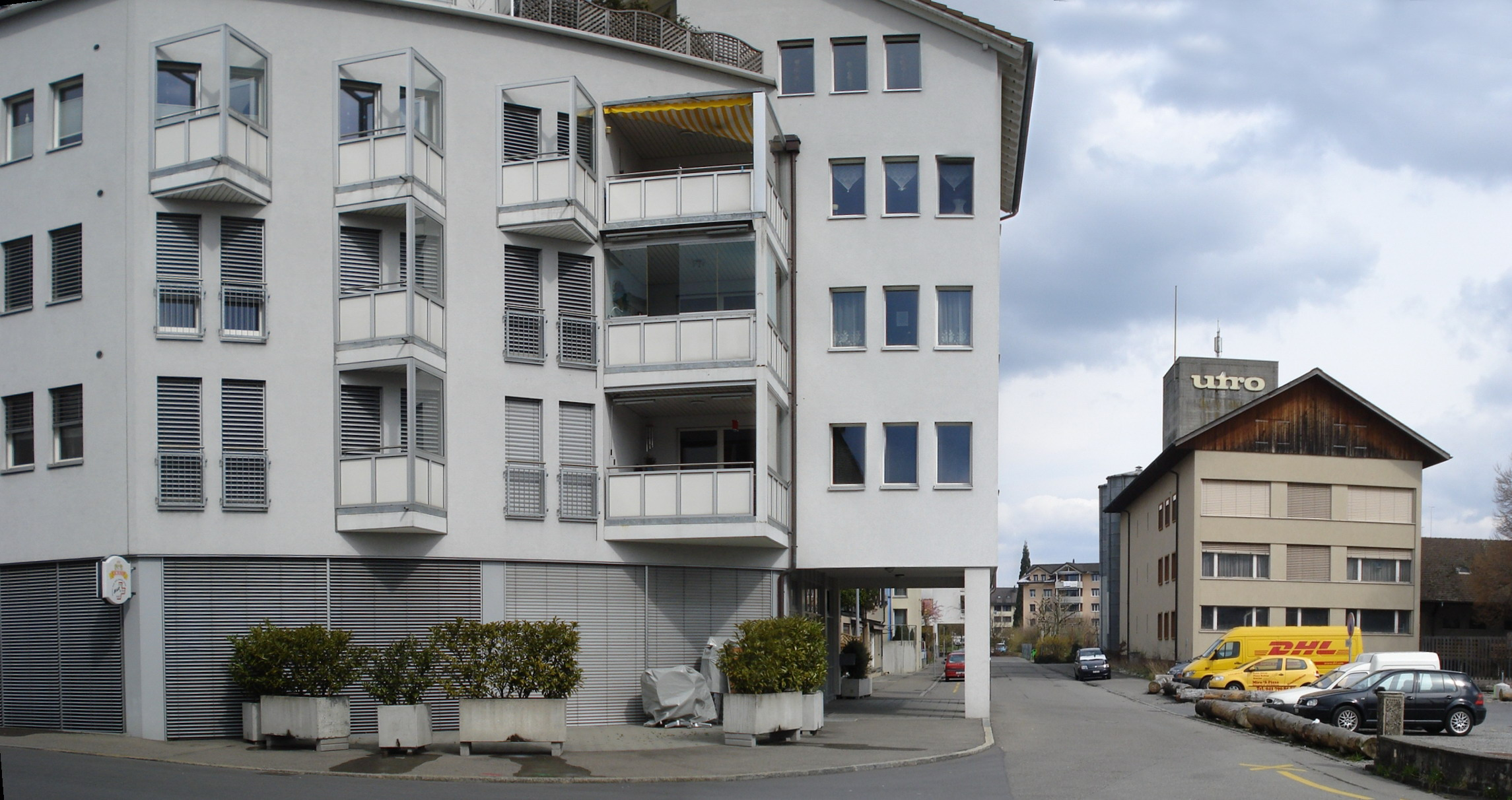 alte Post Rotkreuz